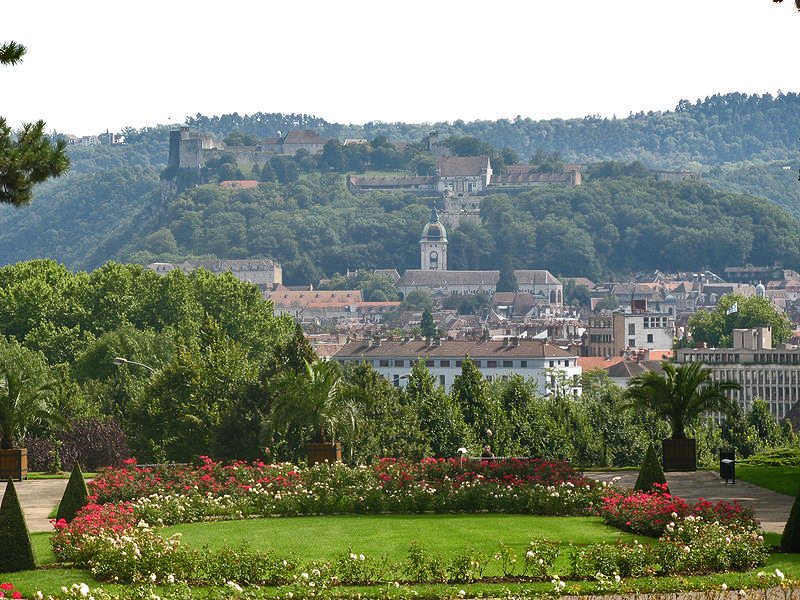 Vue générale de Besançon : Centre ville et citadelle